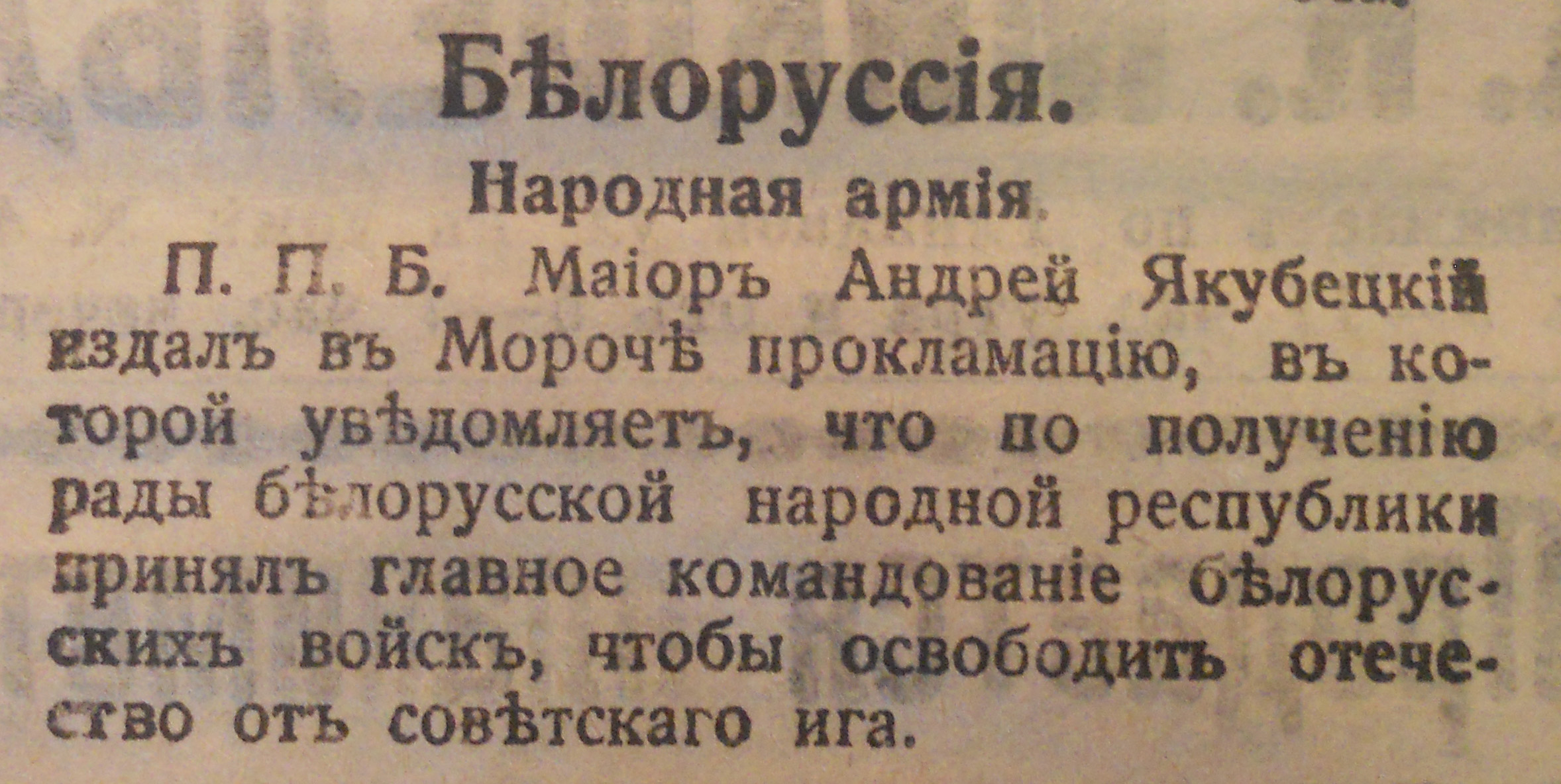 Беларуская (тарашкевіца): Артыкул у газэце «Народное дело» № 16(139) 22.01.1921 Беларусь. Народная Армія. Якубецкі Андрэй.